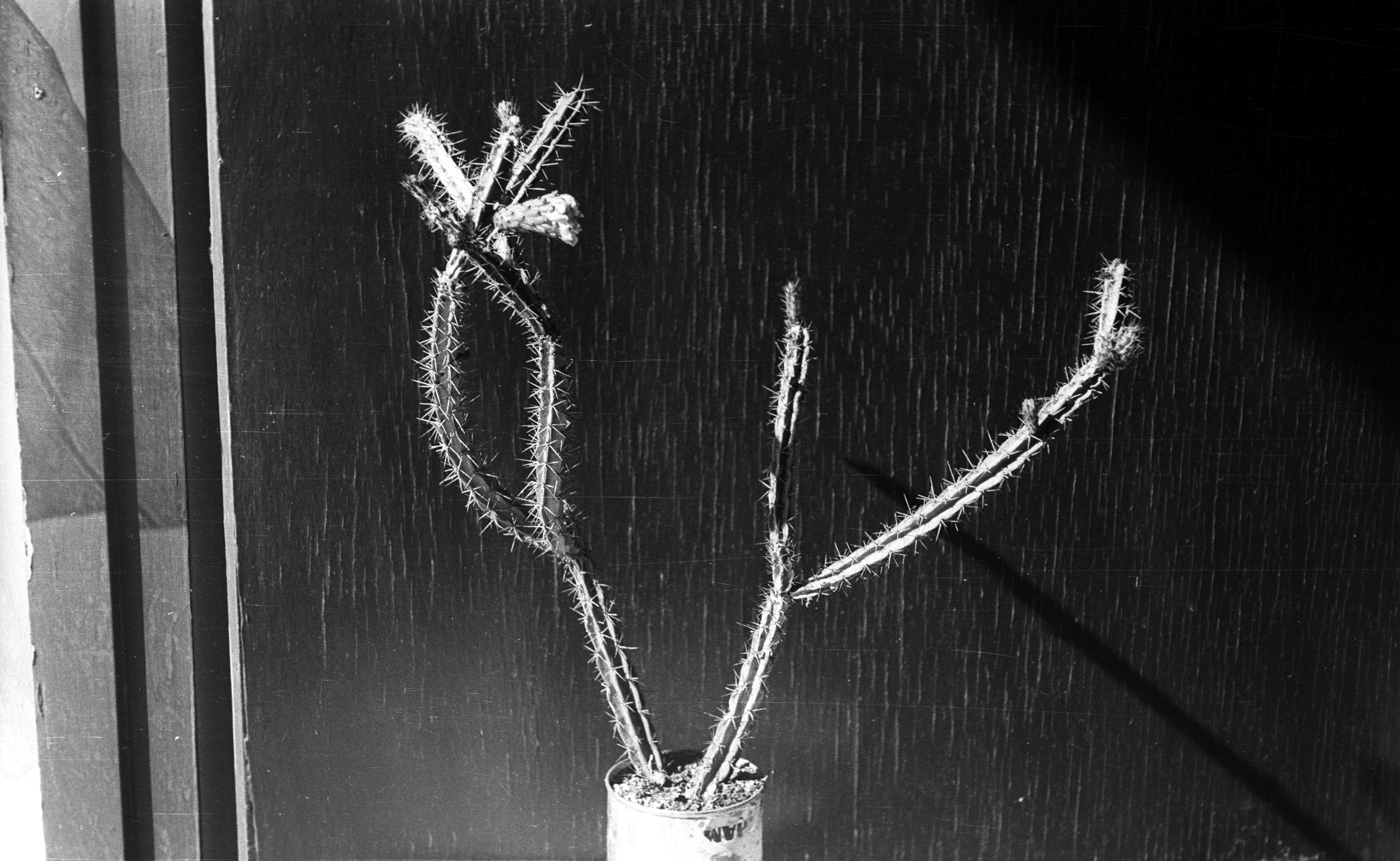 „erdei kaktusz" (Leptocereus). Location: Cuba Tags: cactus Title: „erdei kaktusz\